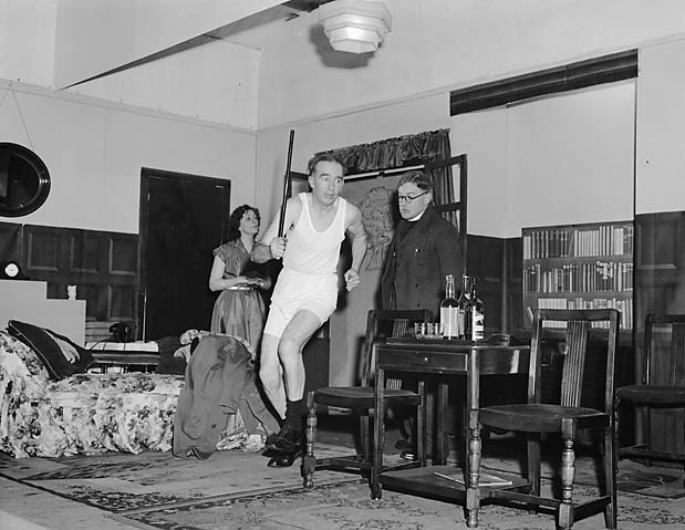 Teitl Cymraeg/Welsh title: Cyflwyniad Cymdeithas Ddrama Amatur Gobowen o "See How They Run" yn Gobowen Ffotograffydd/Photographer: Geoff Charles (1909-2002) Dyddiad/Date: 8/12/1954 Cyfrwng/Medium: Negydd ffilm / Film negative Cyfeiriad/Reference: (gch07297) Rhif cofnod / Record no.: 3368088 Rhagor o wybodaeth am gasgliad Geoff Charles yn Llyfrgell Genedlaethol Cymru More information about the Geoff Charles Collection at the National Library of Wales Mae ffotograffau Geoff Charles hefyd yn rhan o Broject Europeana Libraries Geoff Charles' photographs also form part of the Europeana Libraries Project